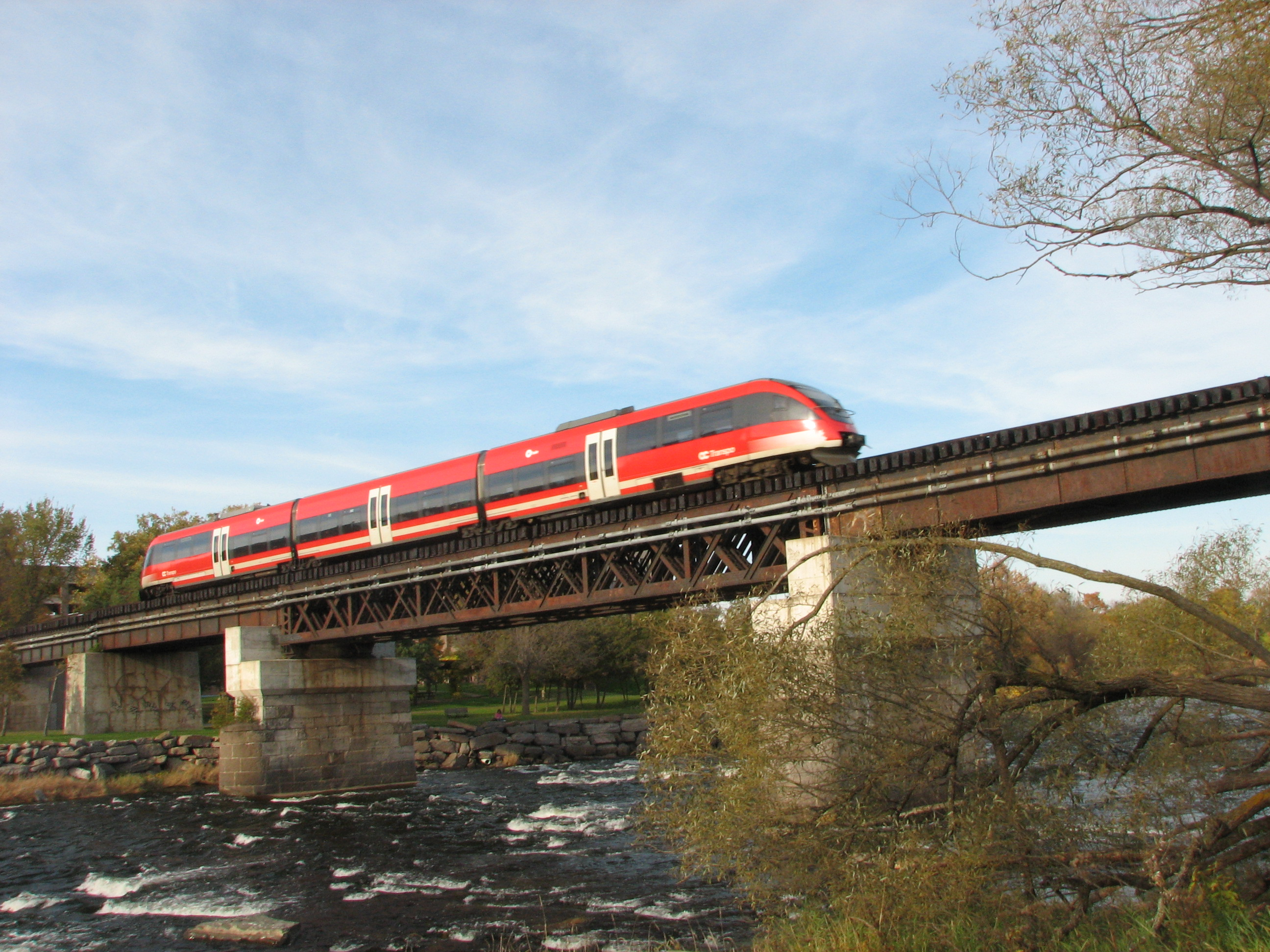 my own stock